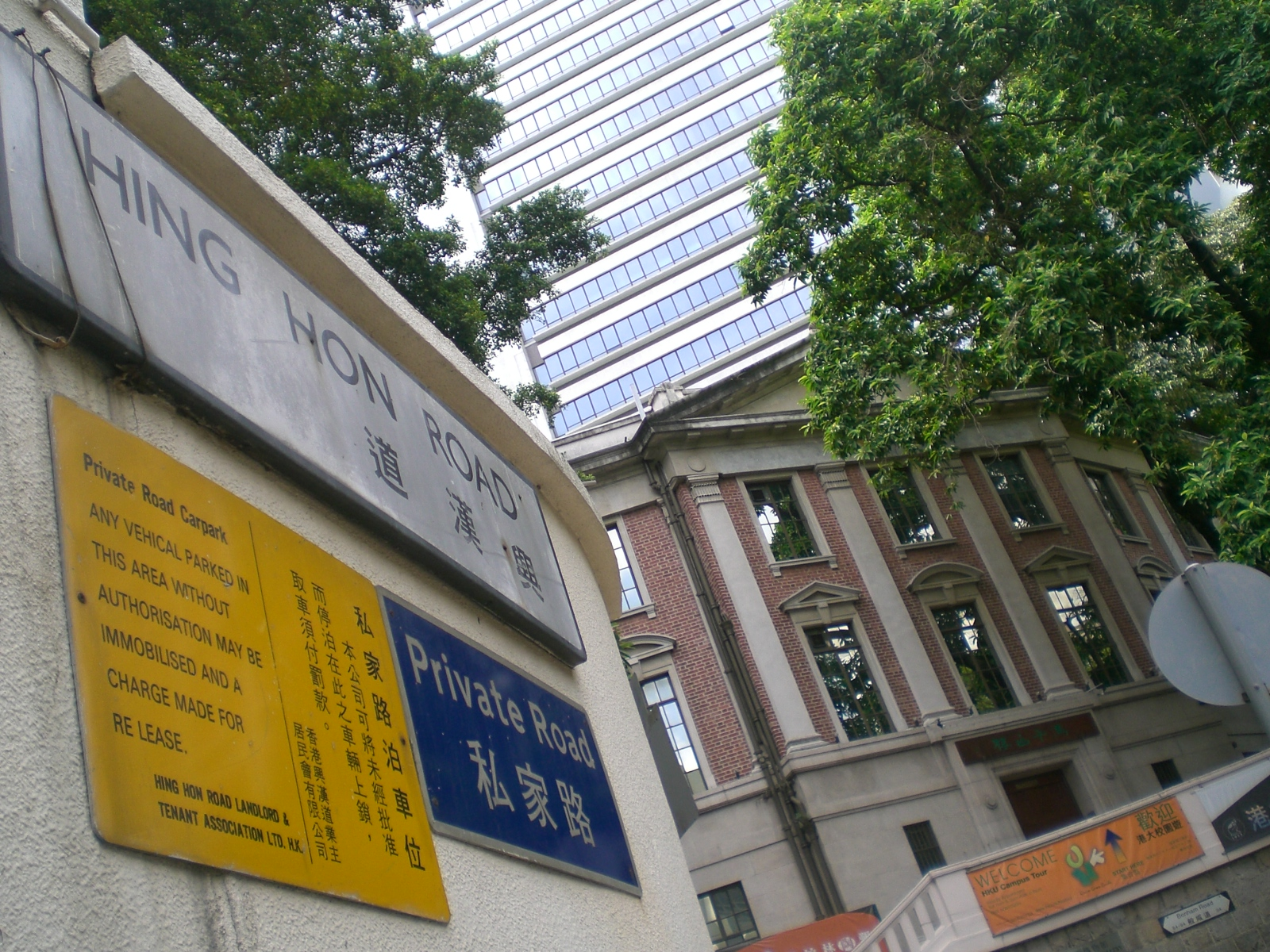 興漢道南近般咸道出口, 見香港大學美術博物館